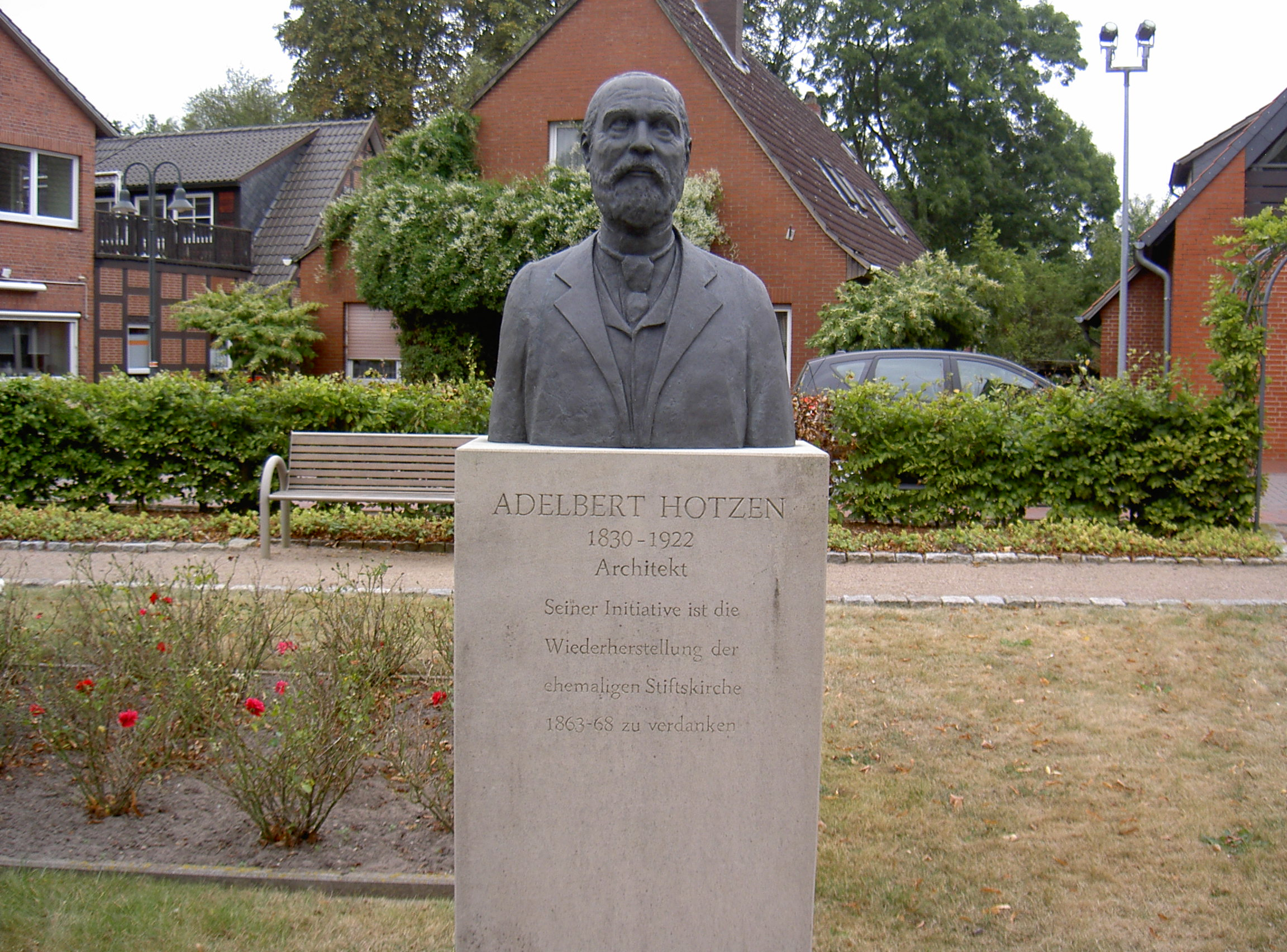 Skulptur von Adelbert Hotzen vor der Stiftskirche in Bücken